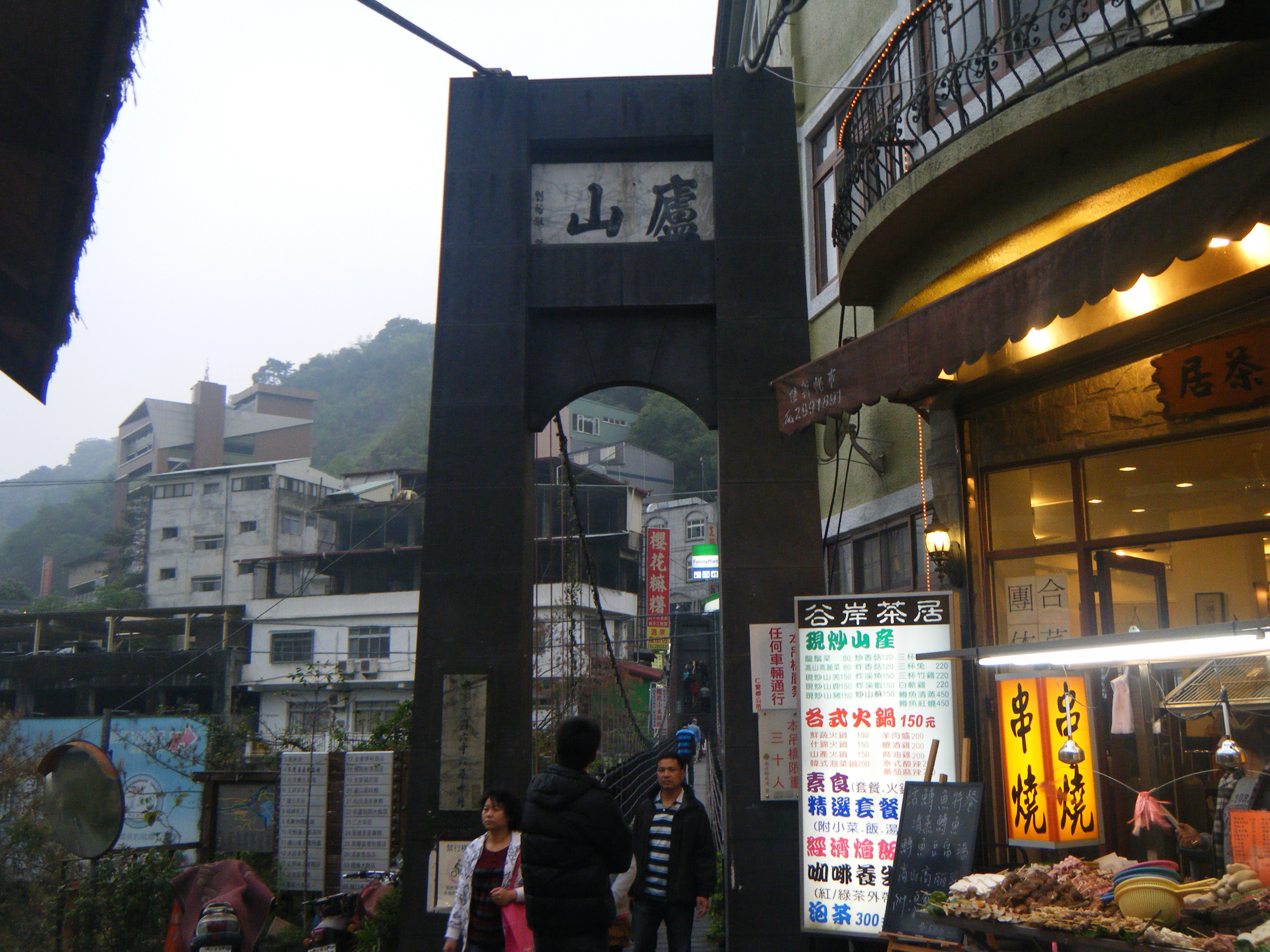 台灣的廬山